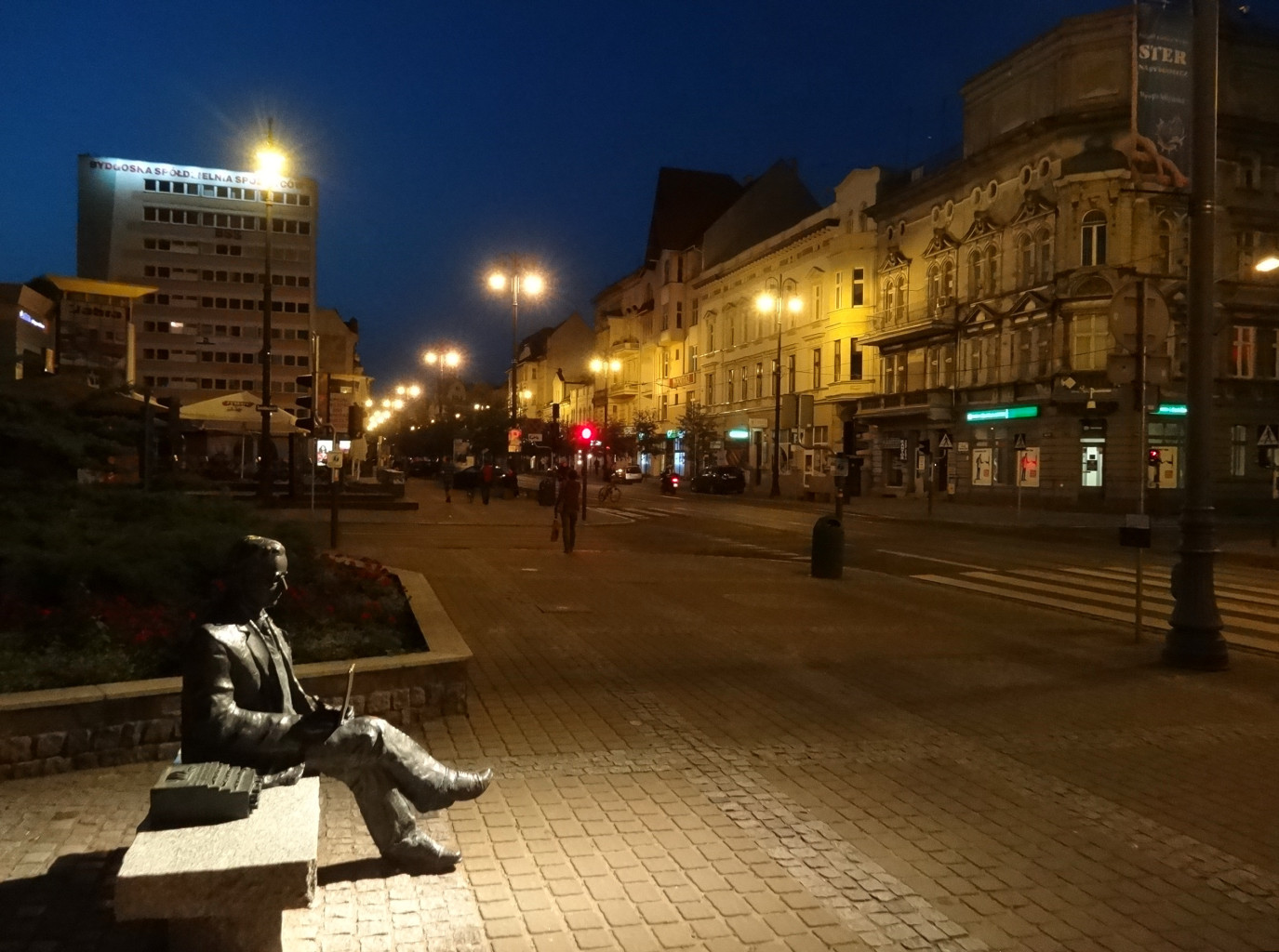 "Ławeczka Mariana Rejewskiego" (autor Michał Kubiak 2005), pogromcy niemieckiej Enigmy, na ulicy Gdańskiej w Bydgoszczy